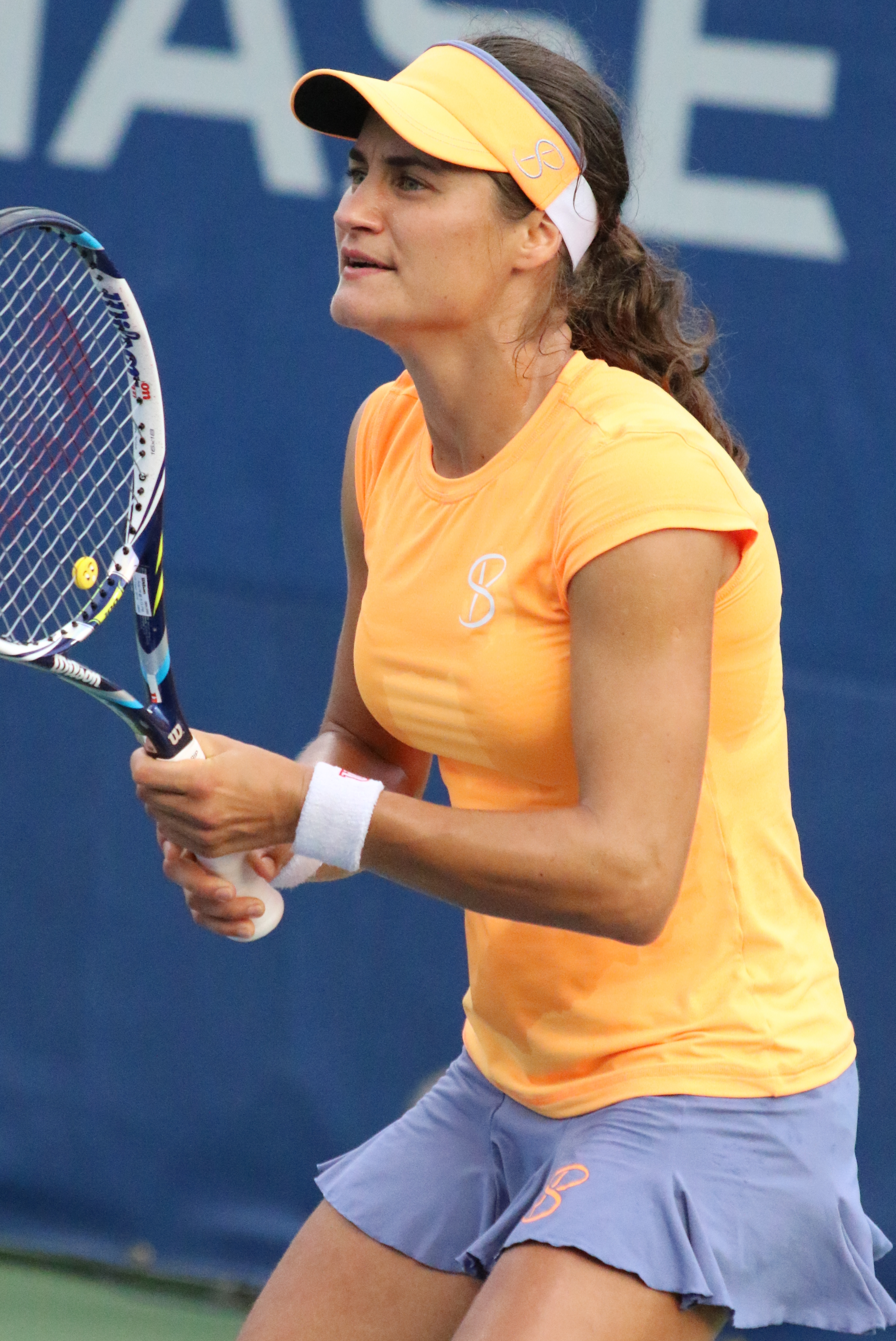 Niculescu US16 (17)